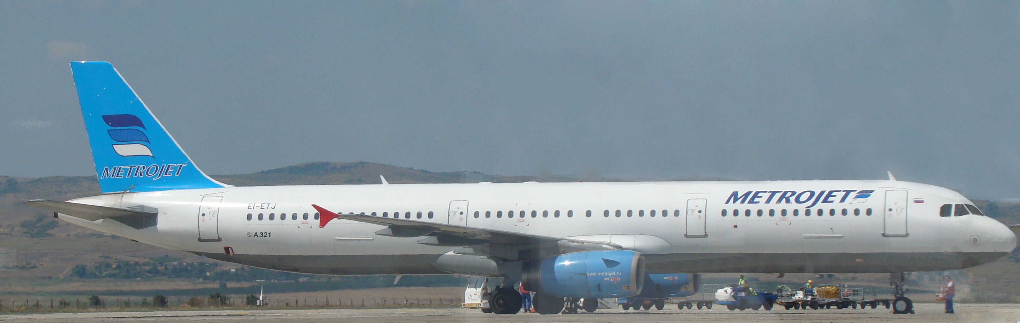 EI-ETJ